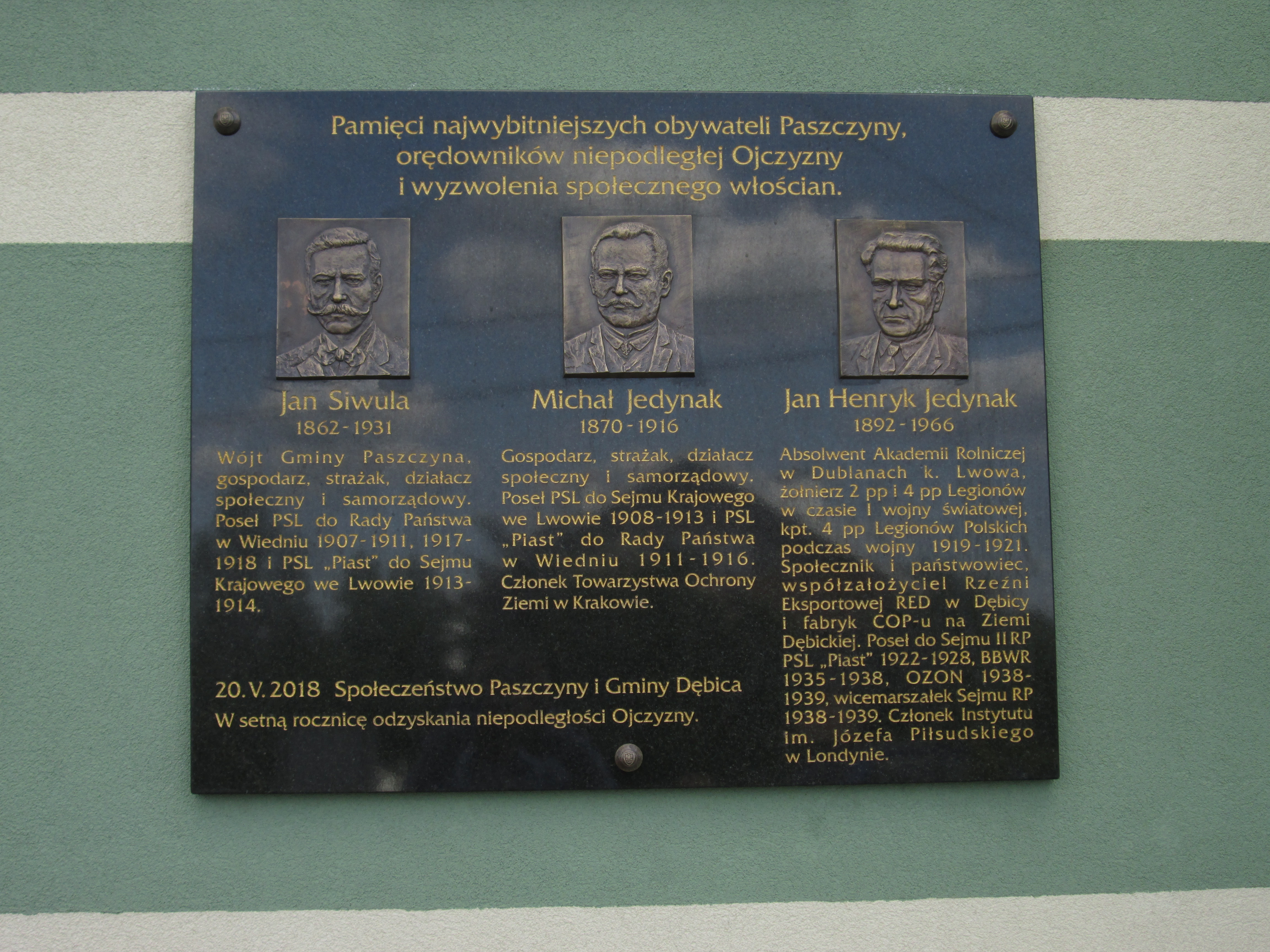 Tablica upamiętniająca posłów paszczyńskich